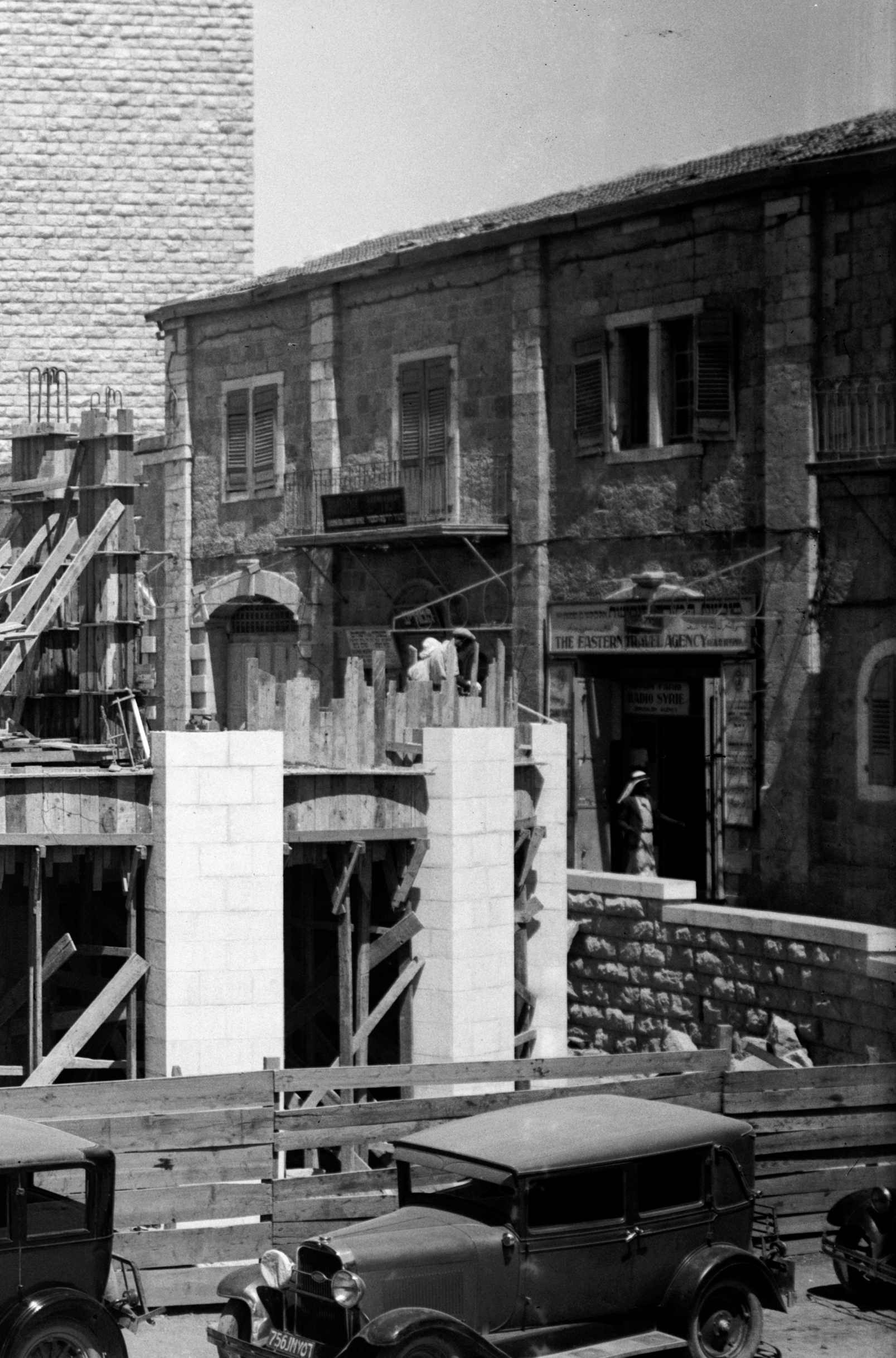 עסקים בחזית הדרום-מערבית של בניין הבייגלמכער בטרם הסתרתה בידי בנין בנק ברקליס